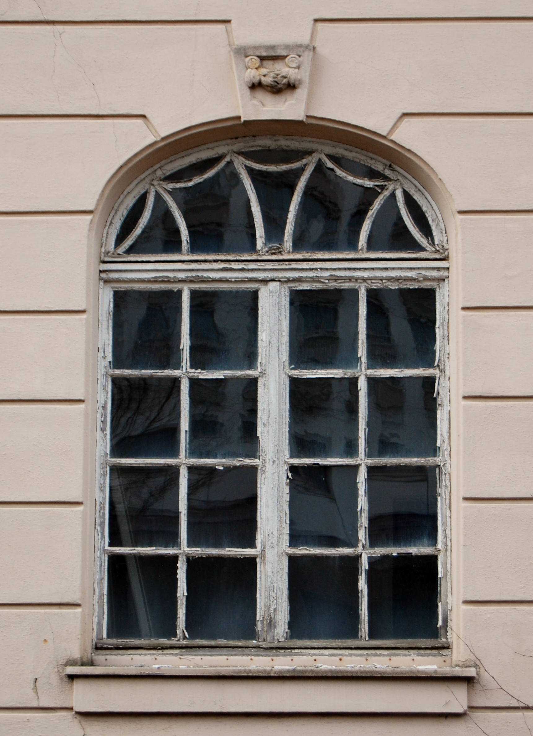 Ein Jugendstilfenster von 1906 im Erdgeschoss des ehemaligen Sanatorium Apolant in Bad Kissingen, Menzelstraße 8-10